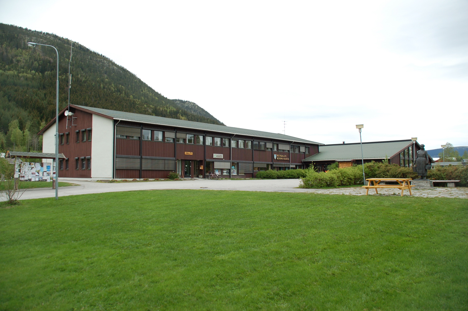 Rendalen Kommunehus, Bergset, Rendalen, Hedmark, Norway